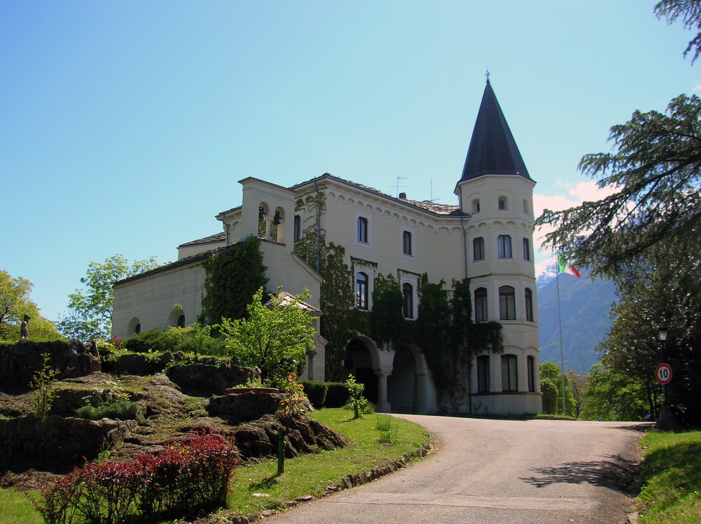 Castello Jocteau, Aosta, Valle d'Aosta, Italia. Il castello di solito non è visitabile: apertura straordinaria in occasione delle Caserme aperte al pubblico per il 151° anniversario dell'Esercito italiano.